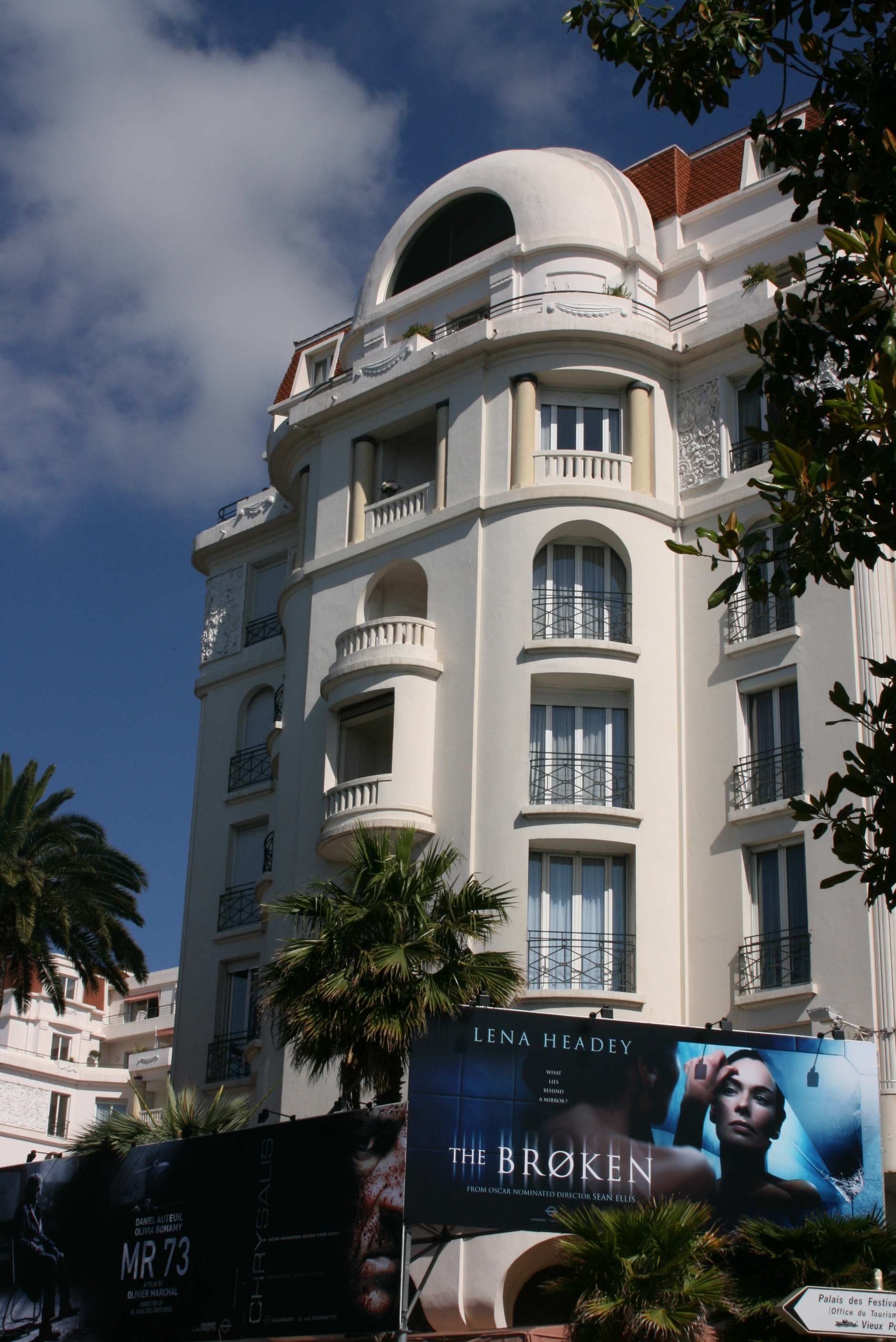 Façade de l'hôtel-palace Majestic à Cannes durant le Festival.